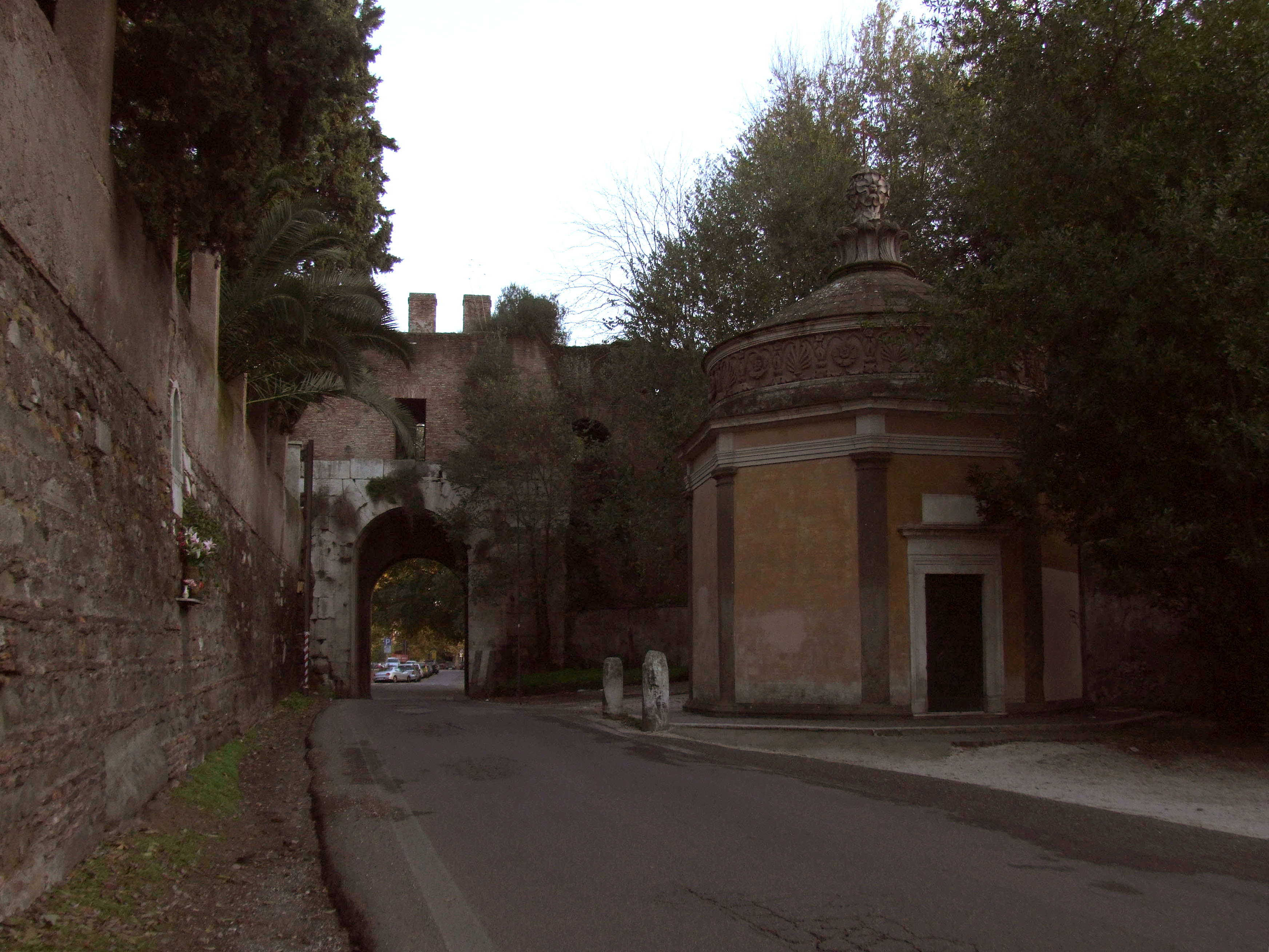 San Giovanni in Oleo, Oratorio a Roma